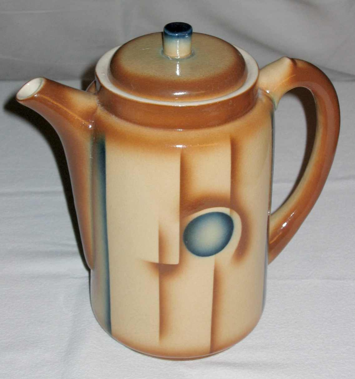 Kaffeekanne mit Spritzglasur, Bunzlau